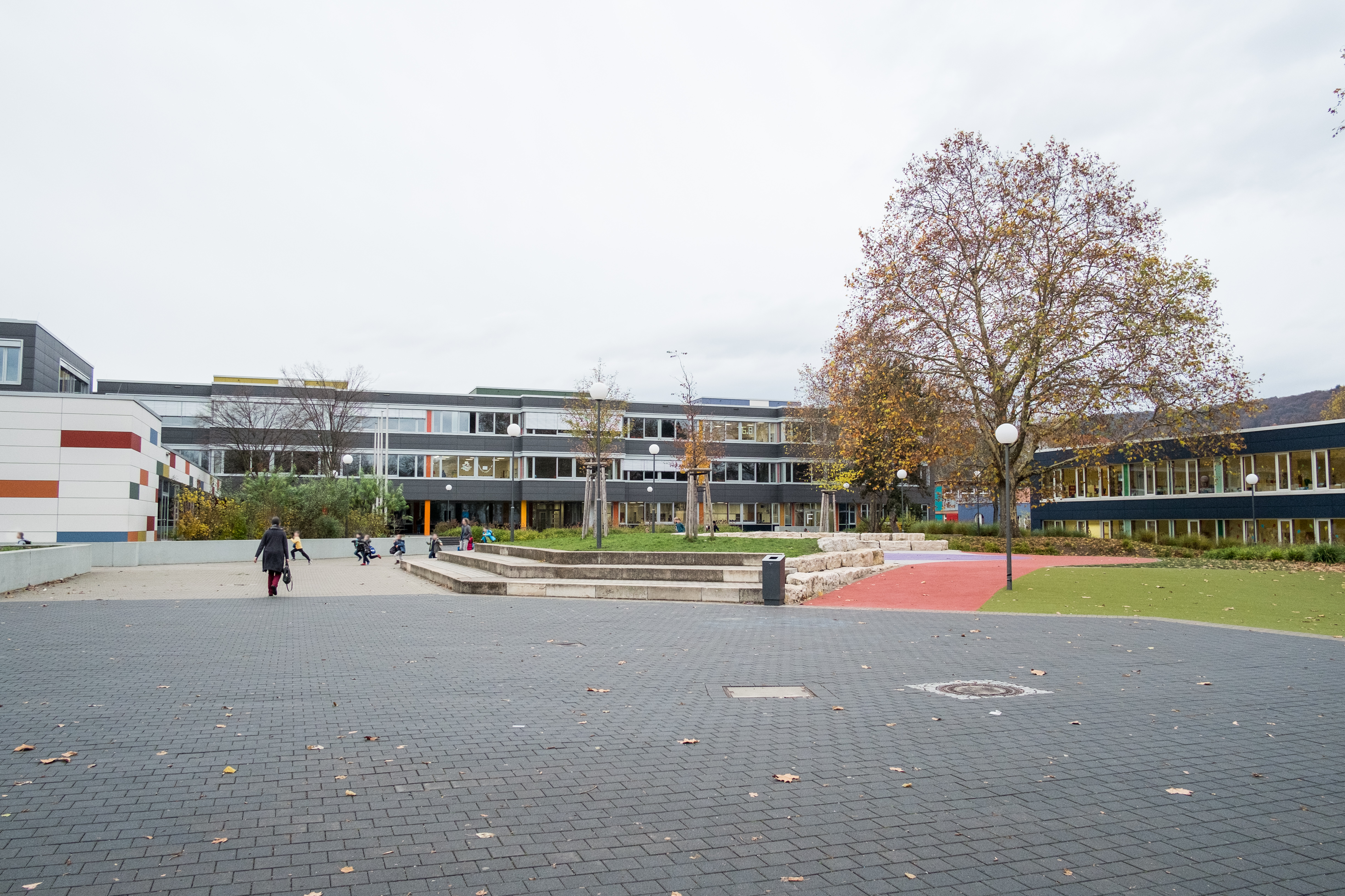 Blick auf Teile der Sekundarstufe der IGH (links) und die die Grundschule/Primarstufe (rechts), mit Schulhof.